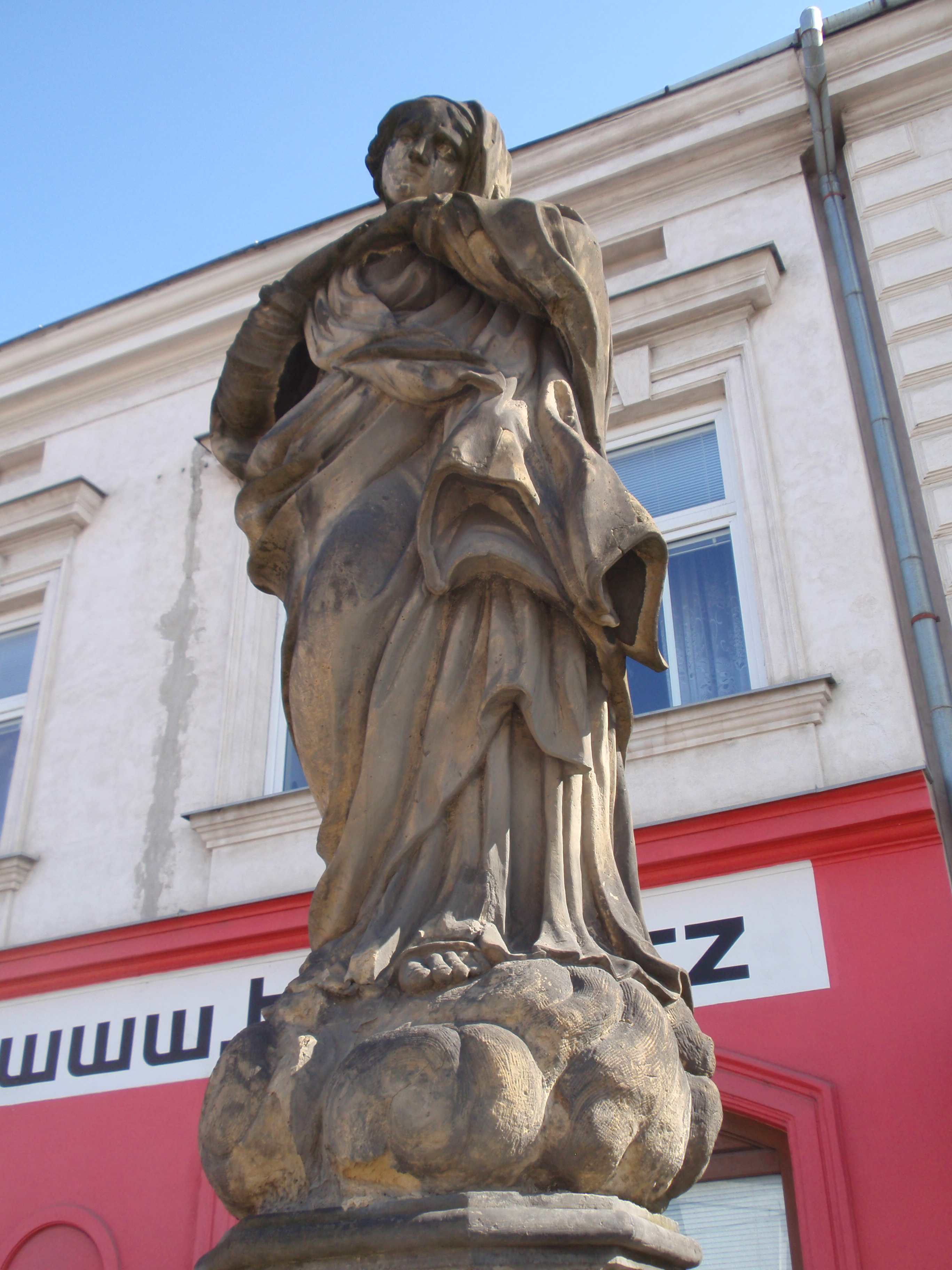 Socha P. Marie (Olomouc), Pavlovická, před domem čp. 44, Olomouc